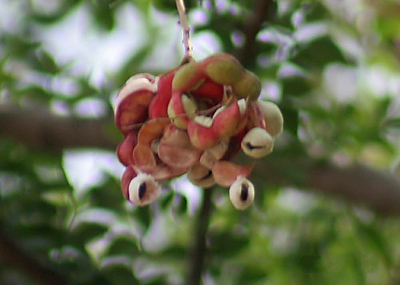 Jungle Jalebi Pithecellobium dulce in Kolkata, West Bengal, India.